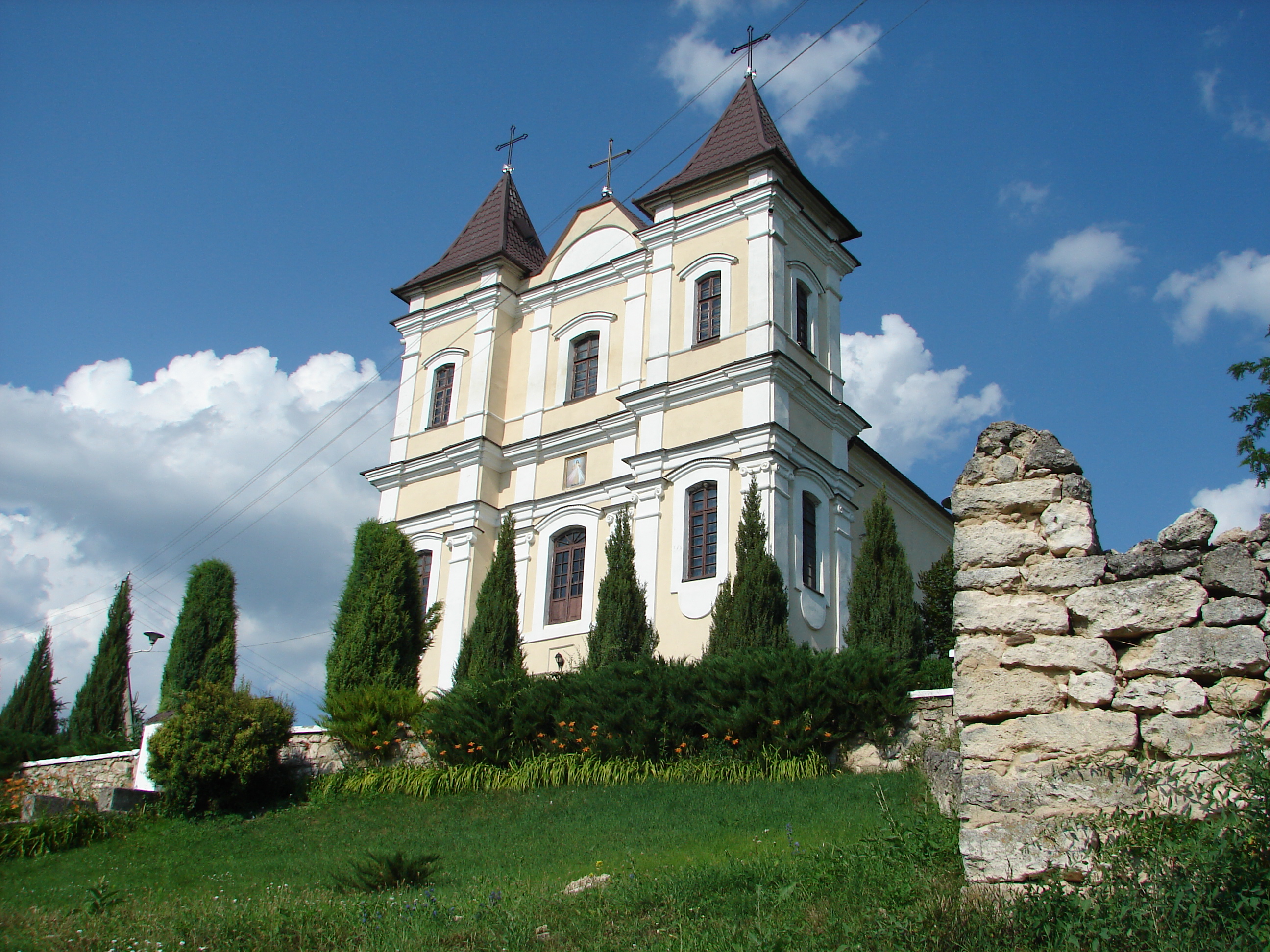 Complexul "Rașcov", monument al naturii amplasat în Transnistria, raionul Camenca, Satul Rașcov, ocolul silvic Rașcov, Dealul Roșu, parcelele 20, 21 (cod MD-CC-mn.A-010) A-010